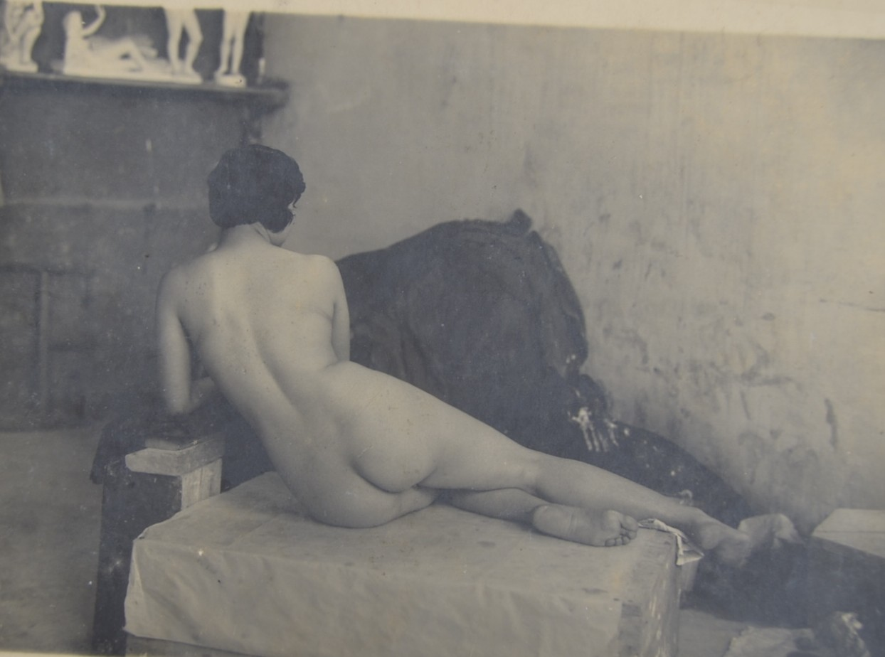 Foto de la model per a obra de Viladomat Nu del blau, conservada al Museu d'Art de Cerdanyola